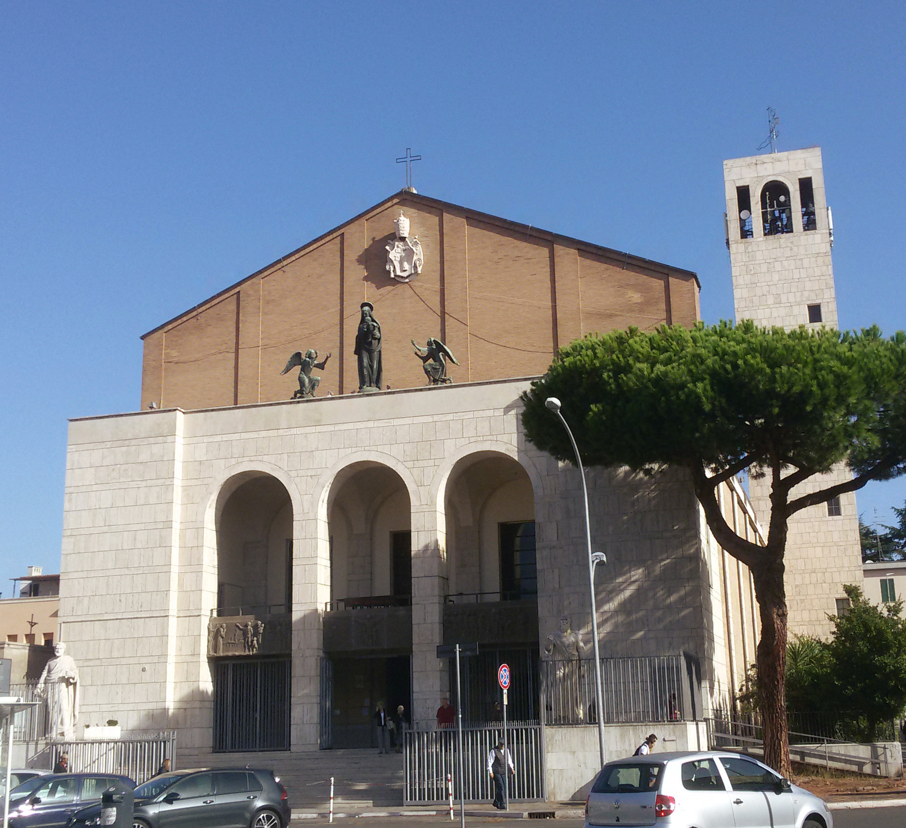 L'esterno della chiesa di Santa Maria della Salute, in piazza Capecelatro.